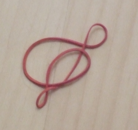 Gummiband, welches sich durch den Fall vom Schreibtisch in einen Notenschlüssel formte